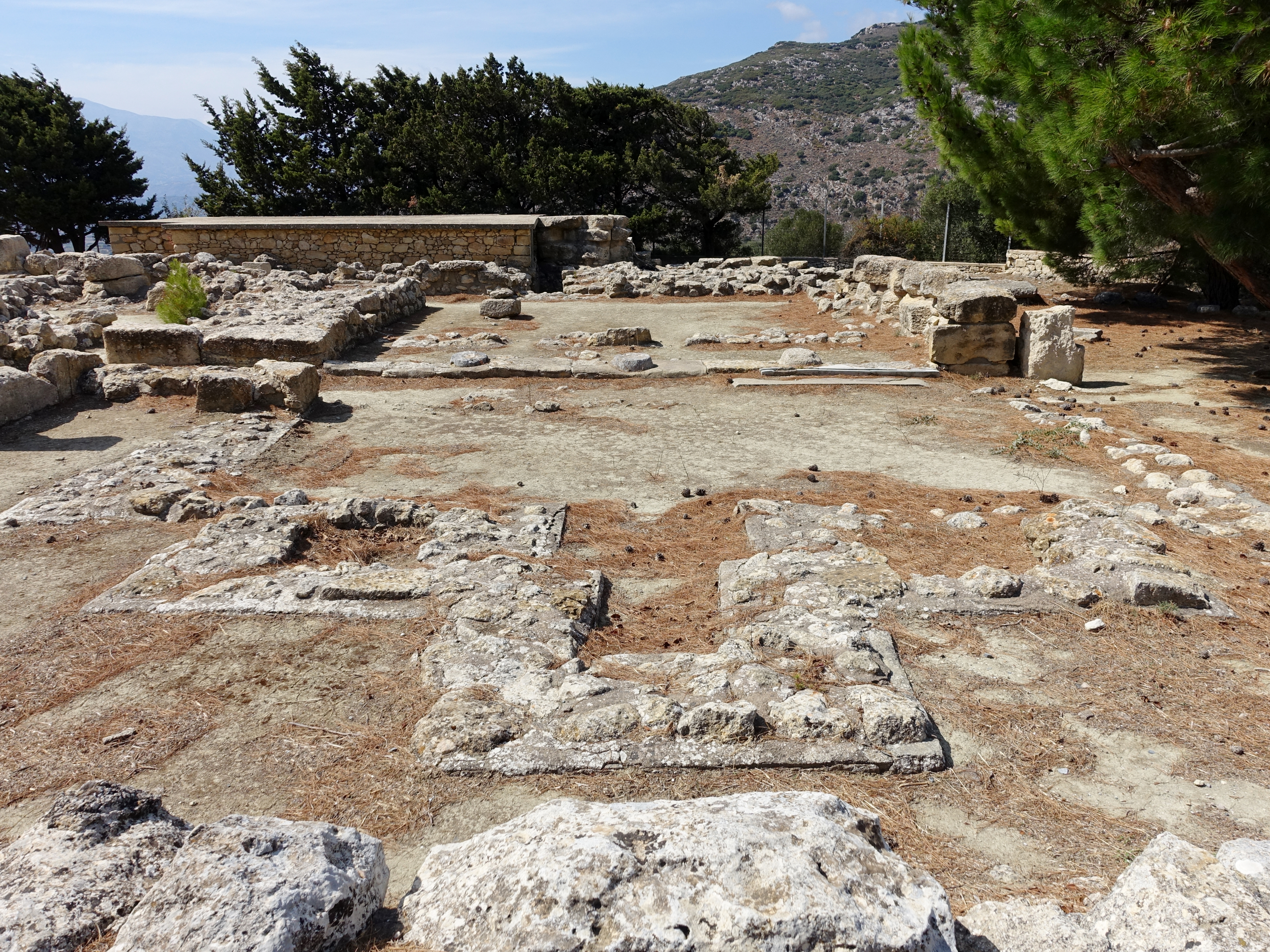 Ausgrabungsstätte der „Villa“ von Vathypetro (Βαθύπετρο), Gemeinde Archanes-Asterousia, Kreta, Griechenland